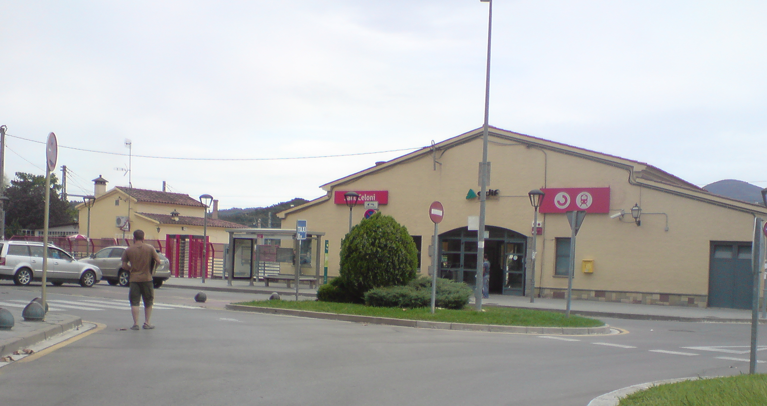 Fachada de la estación